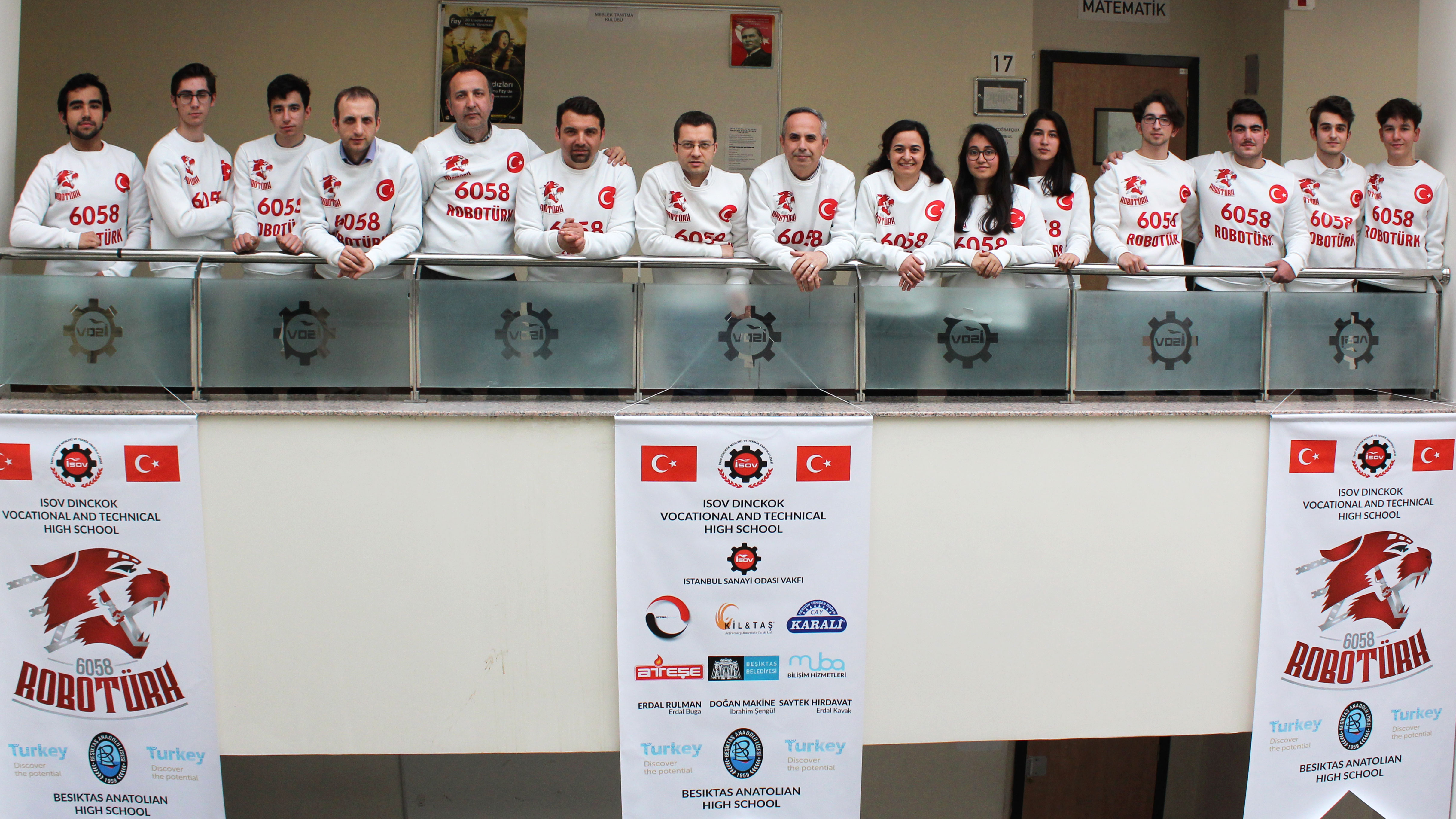 ROBOTÜRK 6058 Takımının 2017 kadrosu ve sponsorların bulunduğu fotoğraf